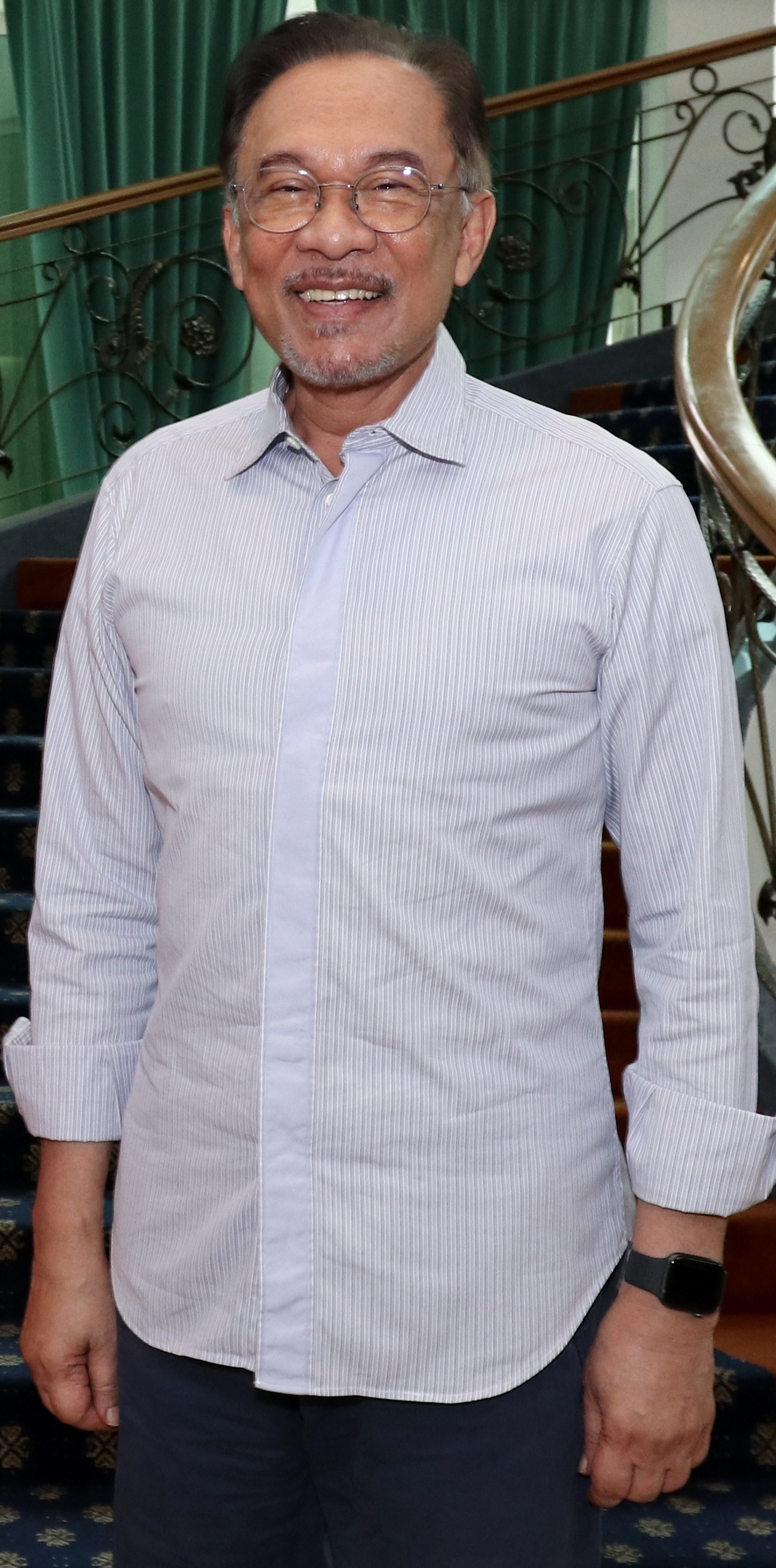 Ambassador Kamala meeting with Dato' Seri Anwar Ibrahim